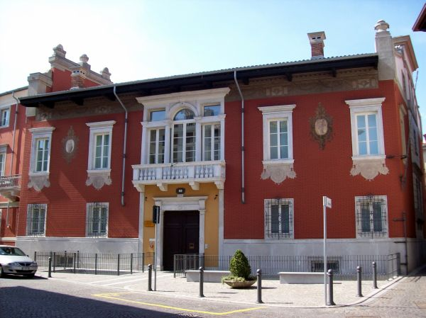 Udine-Palazzo Giacomelli, realizzato nel'Ottocento dall'architetto friulano Giovanni Battista Bassi. Attuale sede del Museo etnografico del Friuli.